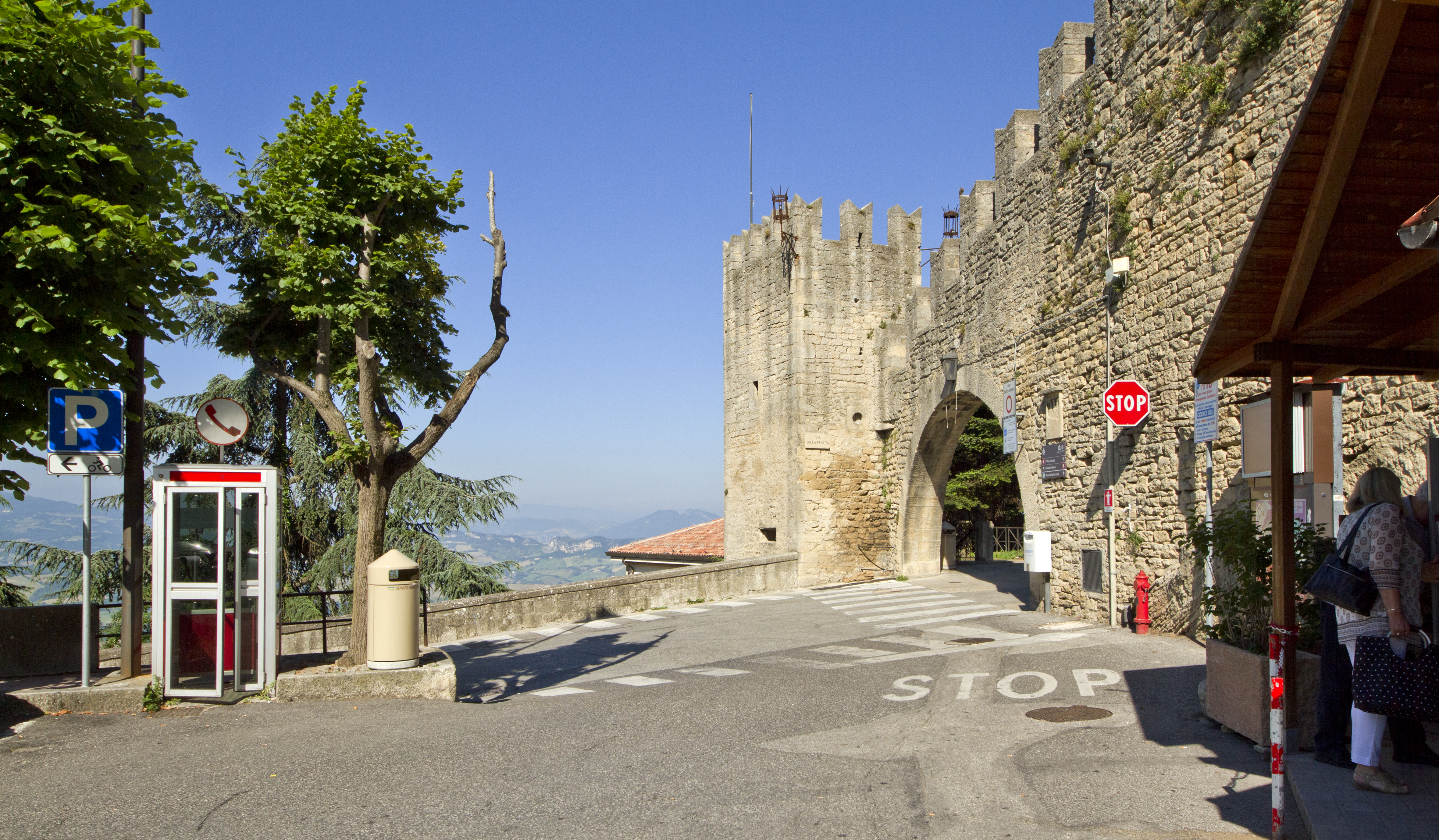 Viale Antonio Onofri, 14, 47890 Città di San Marino, San Marino